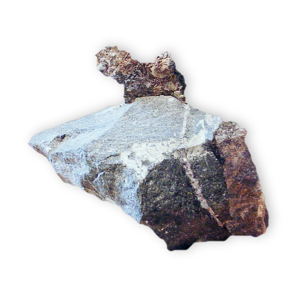 Silver Leaf on Andesine Rock